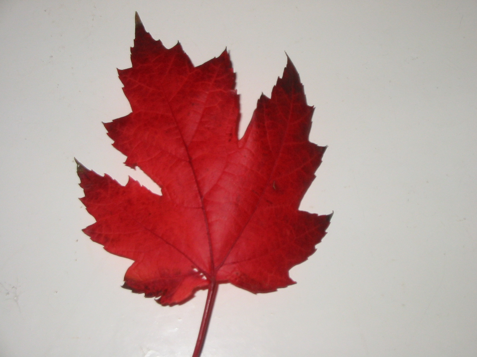 Canadian maple leaf Acer rubrum